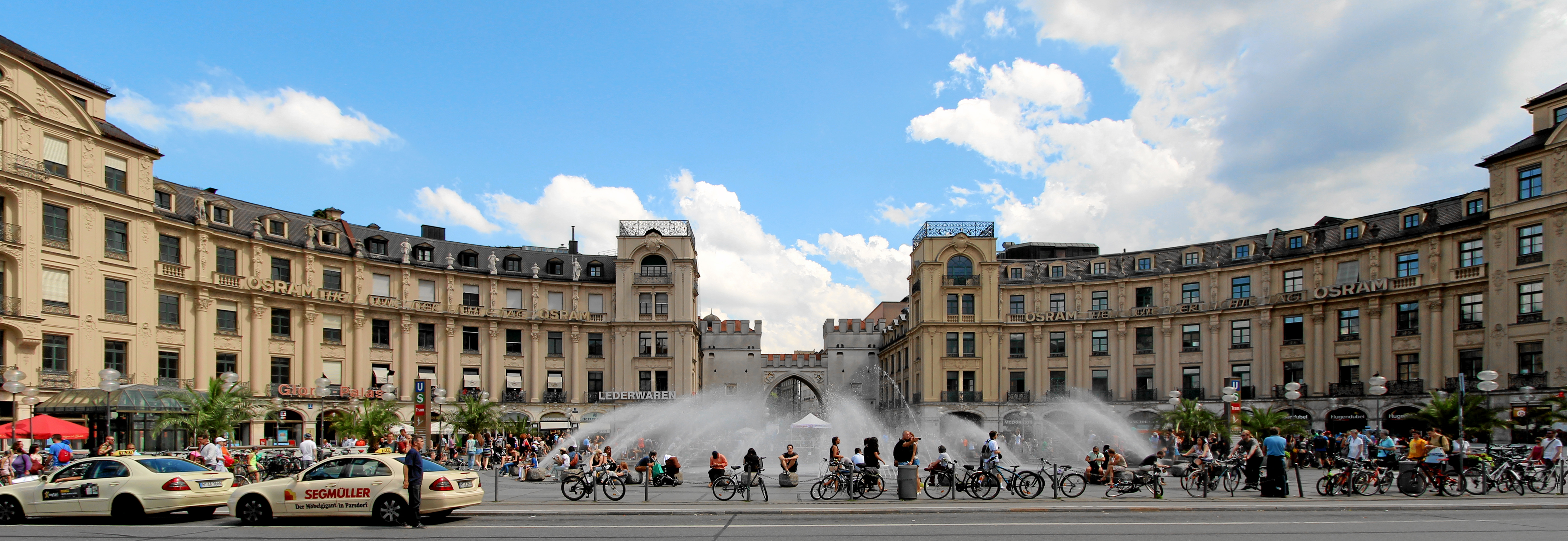 Der Stachus 2014